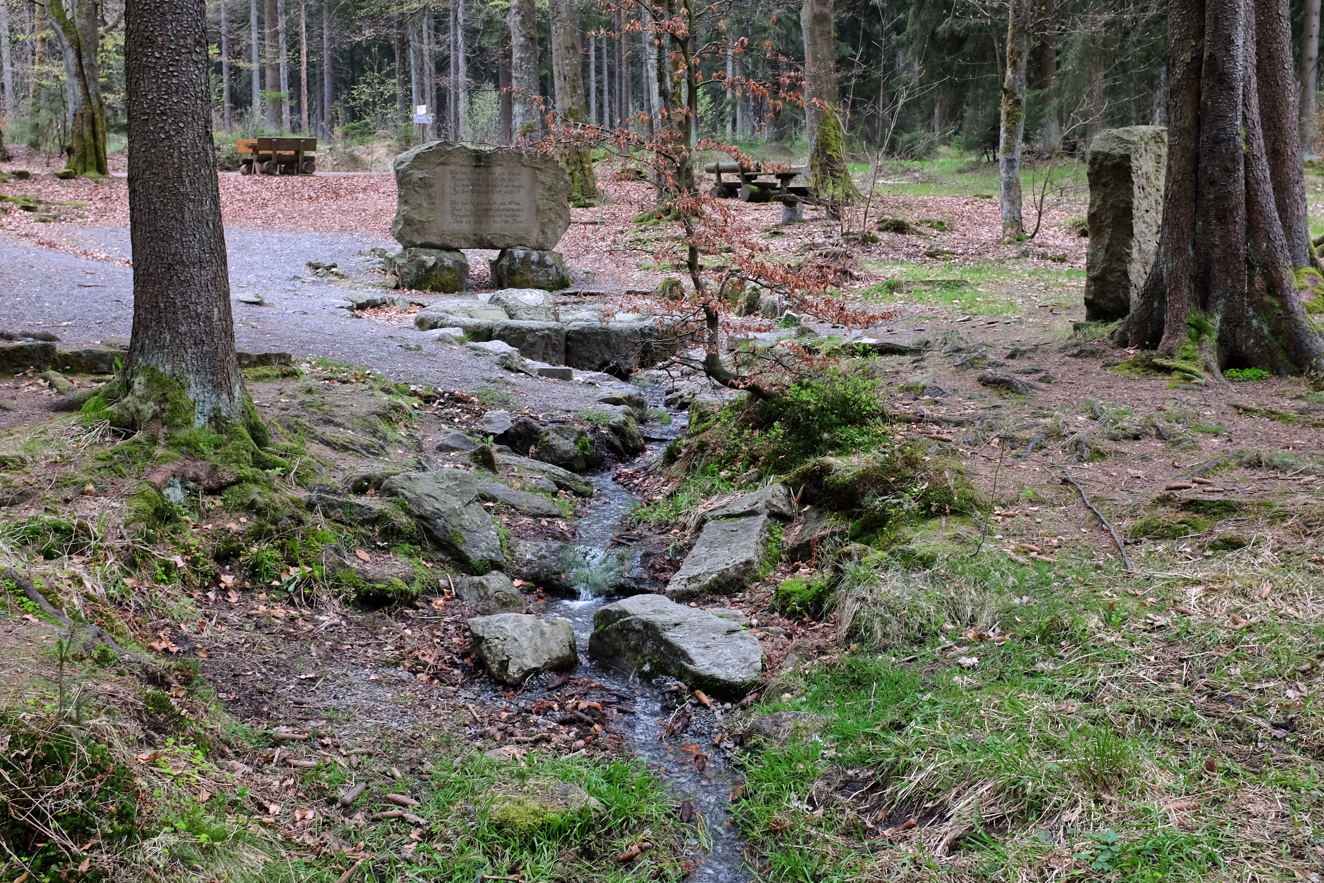 Pramen Ohře ve Smrčinách, Horní Franky, Bavorsko